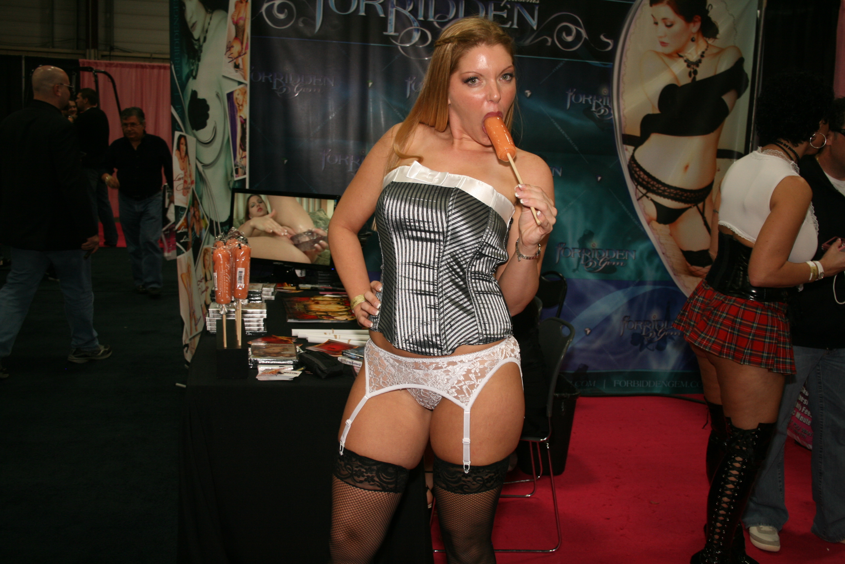 Candi Apple Exxxotica 2009